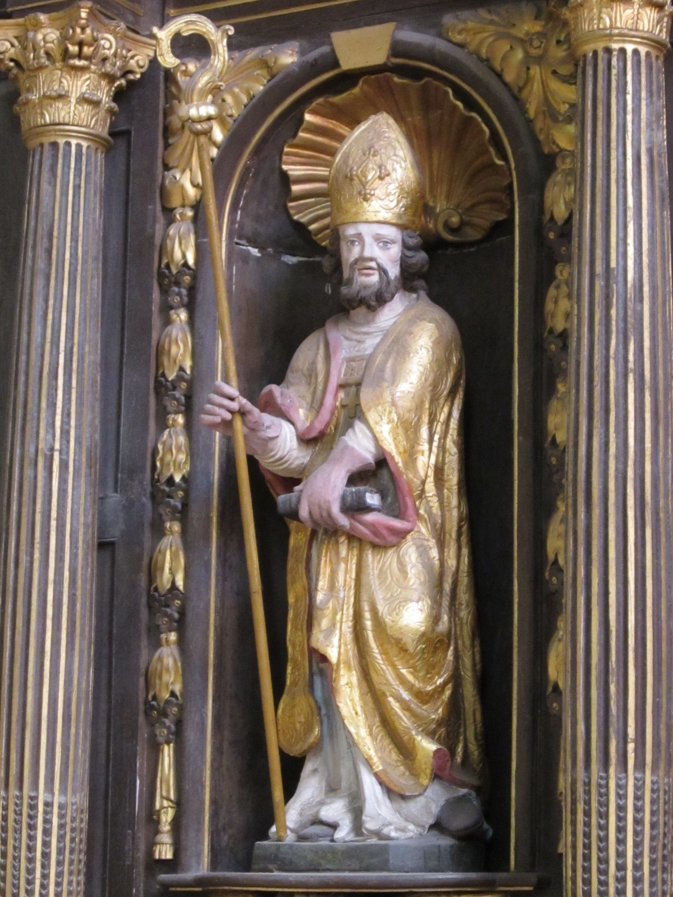 Statue de Saint Guénolé dans l'Eglise Saint Guénolé de Bourg de Batz.